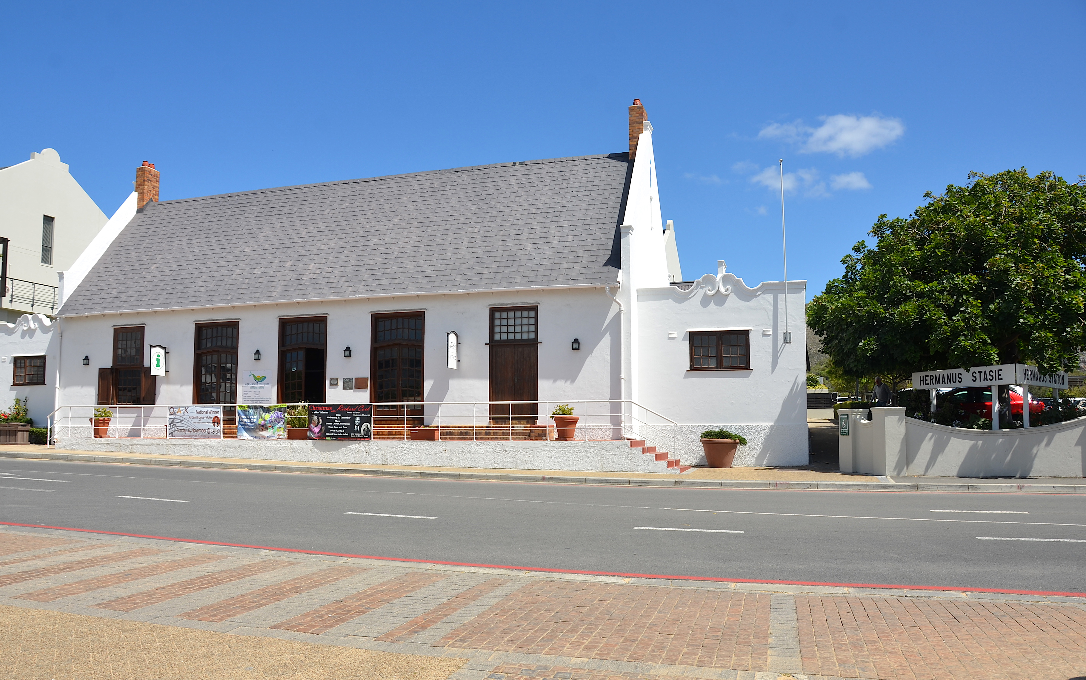 Historische Bahnstation in Hermanus (heute Hermanus Tourism), Südafrika